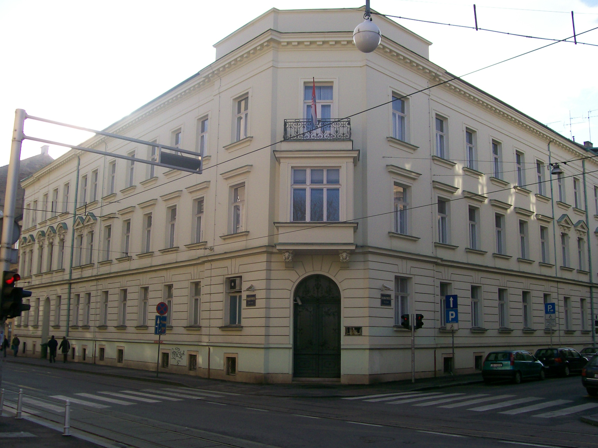 Upravni sud Zagreb